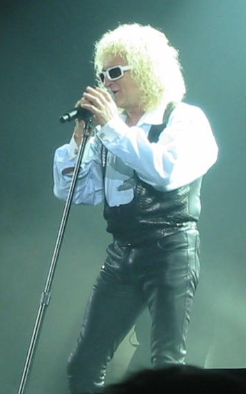 Le chanteur français Michel Polnareff à Bercy, en 2007.